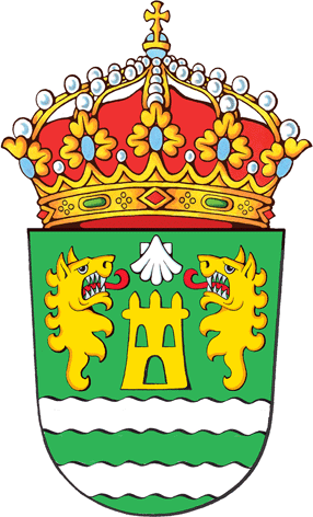 Escudo de A Fonsagrada